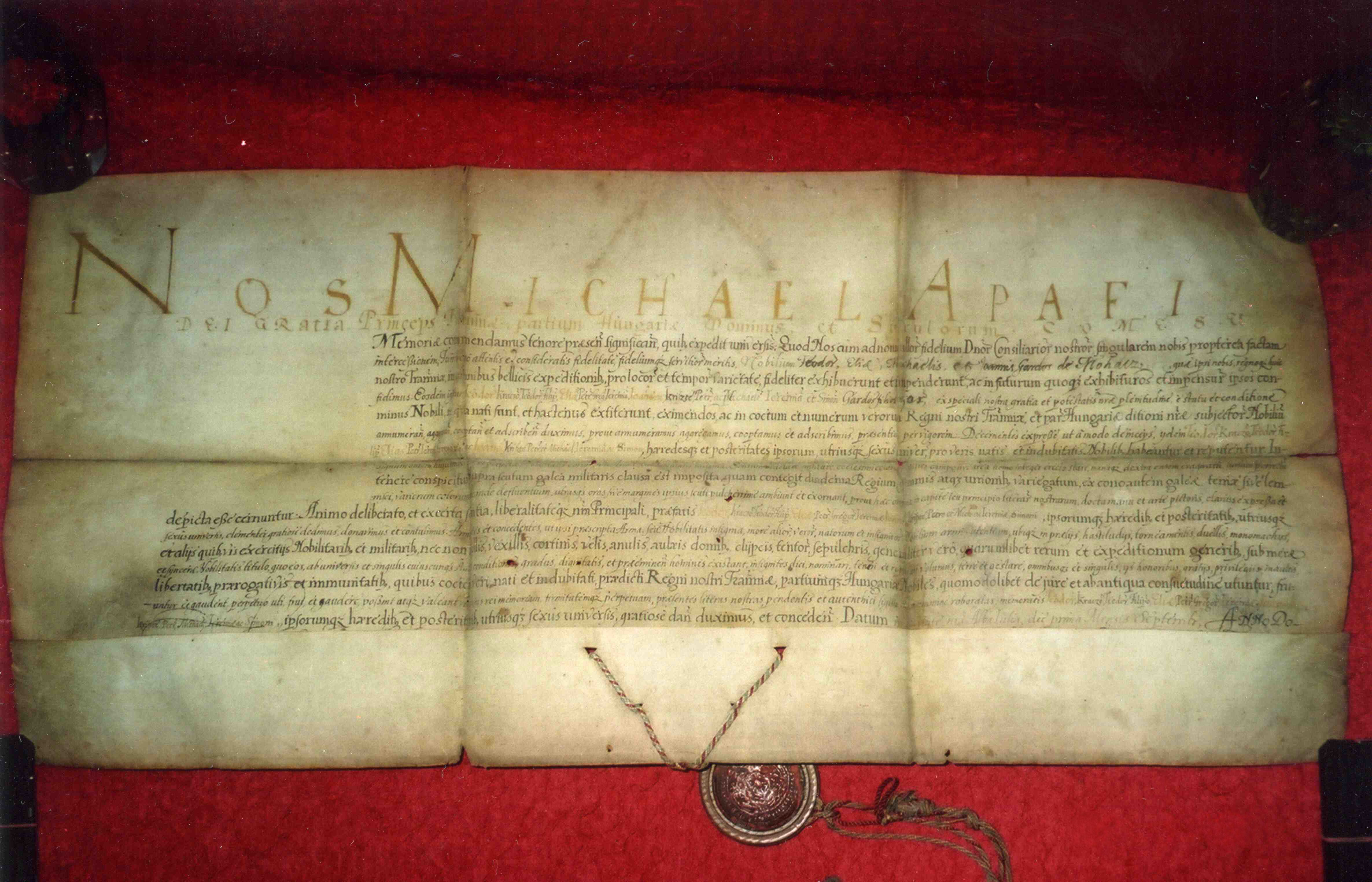 Diplomă de înnobilare a fraţilor Gardos (Gărduş) din Mohacz (Măhăceni, judeţul Alba, Transilvania, România) de către principele Mihai Apafi I în anul 1668.